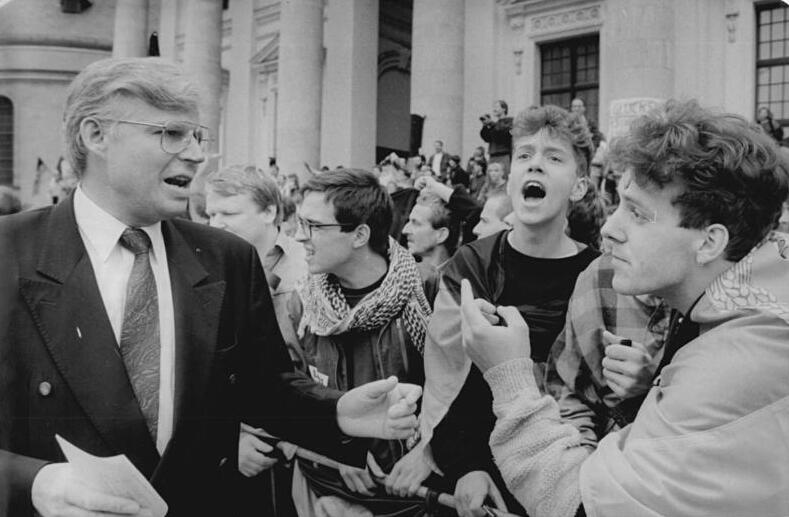 ADN- Settnik 17.6.90 Berlin: 17. Juni- Eine gemeinsame Gedenkveranstaltung beider deutscher Parlamente zum 17. Juni 1953 fand im Berliner Schauspielhaus statt. Während drinnen Einvernehmen über die Wertung dieses Tages herrschte, ging es vor dem Haus zwischen Demonstranten verschiedener politischer Richtungen recht kontrovers zu. FDP-Bundestagsabgeordneter Werner Zywietz (l) stellte sich der Diskussion mit jungen Linken.